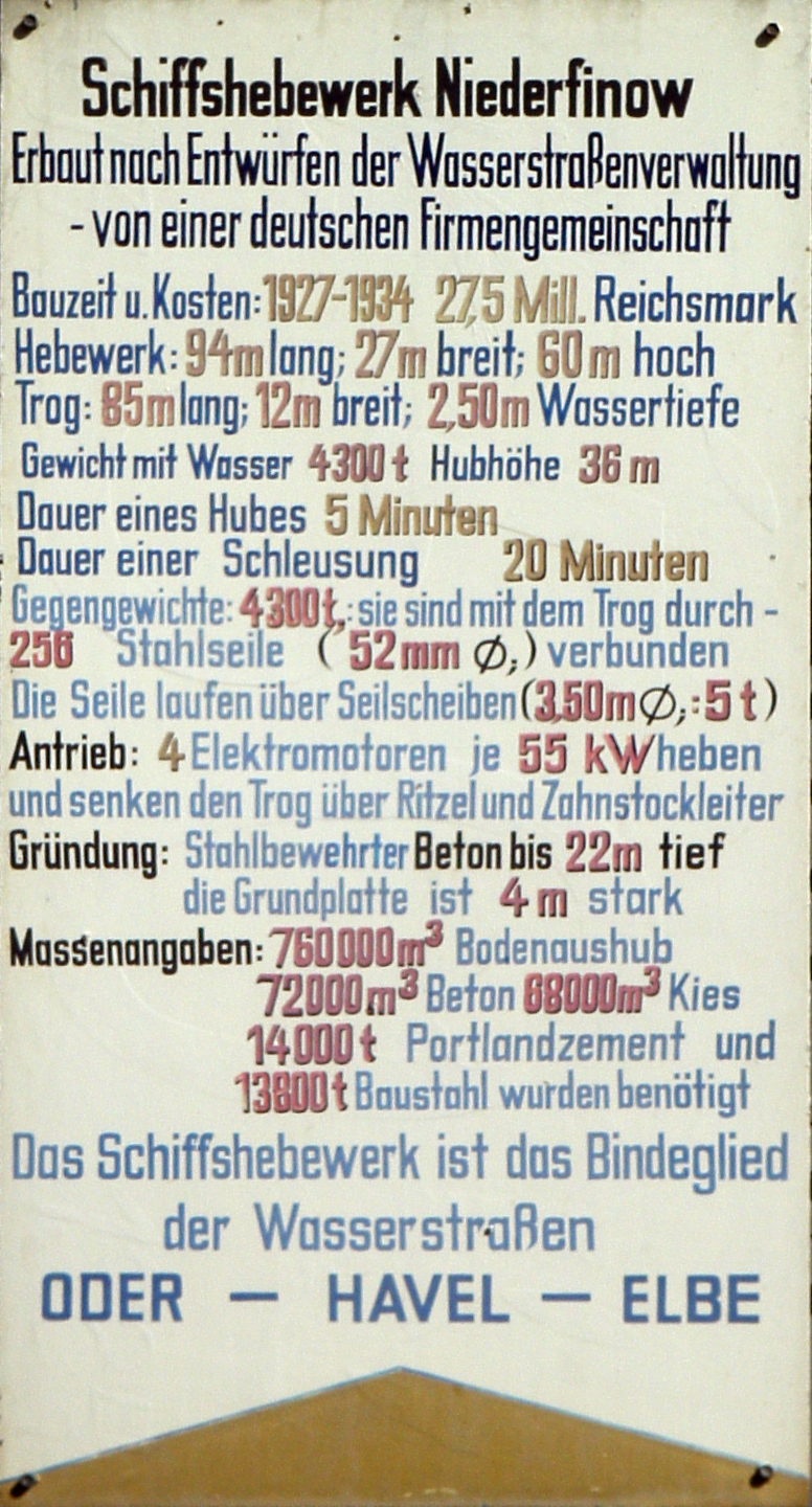 Osterausflug 2006 im Biosphärenreservat Schorfheide-Chorin - Beschriftungsschild am Schiffshebewerk Niederfinow